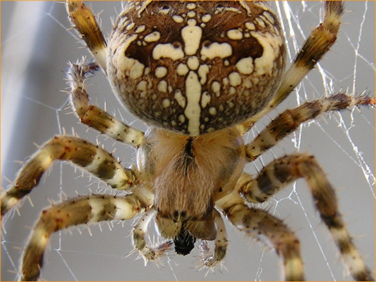 Épeire diadème Araneus diadematus Clerk : Petite araignée de jardin